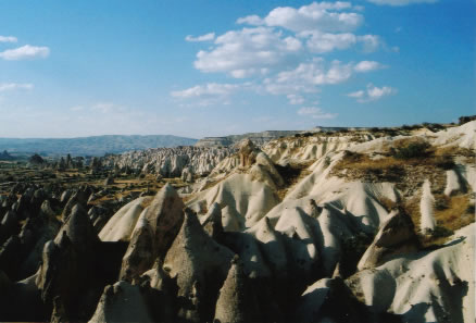 Goreme Turquie Cappadoce_2006_02.jpg